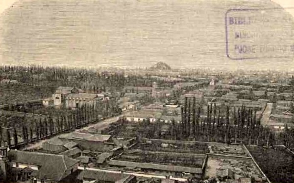 Descripción original del libro: Santiago.– Vista jeneral tomada de la Recoleta.